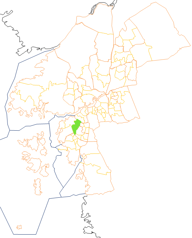 Karta som visar primärområdes belägenhet i Göteborg